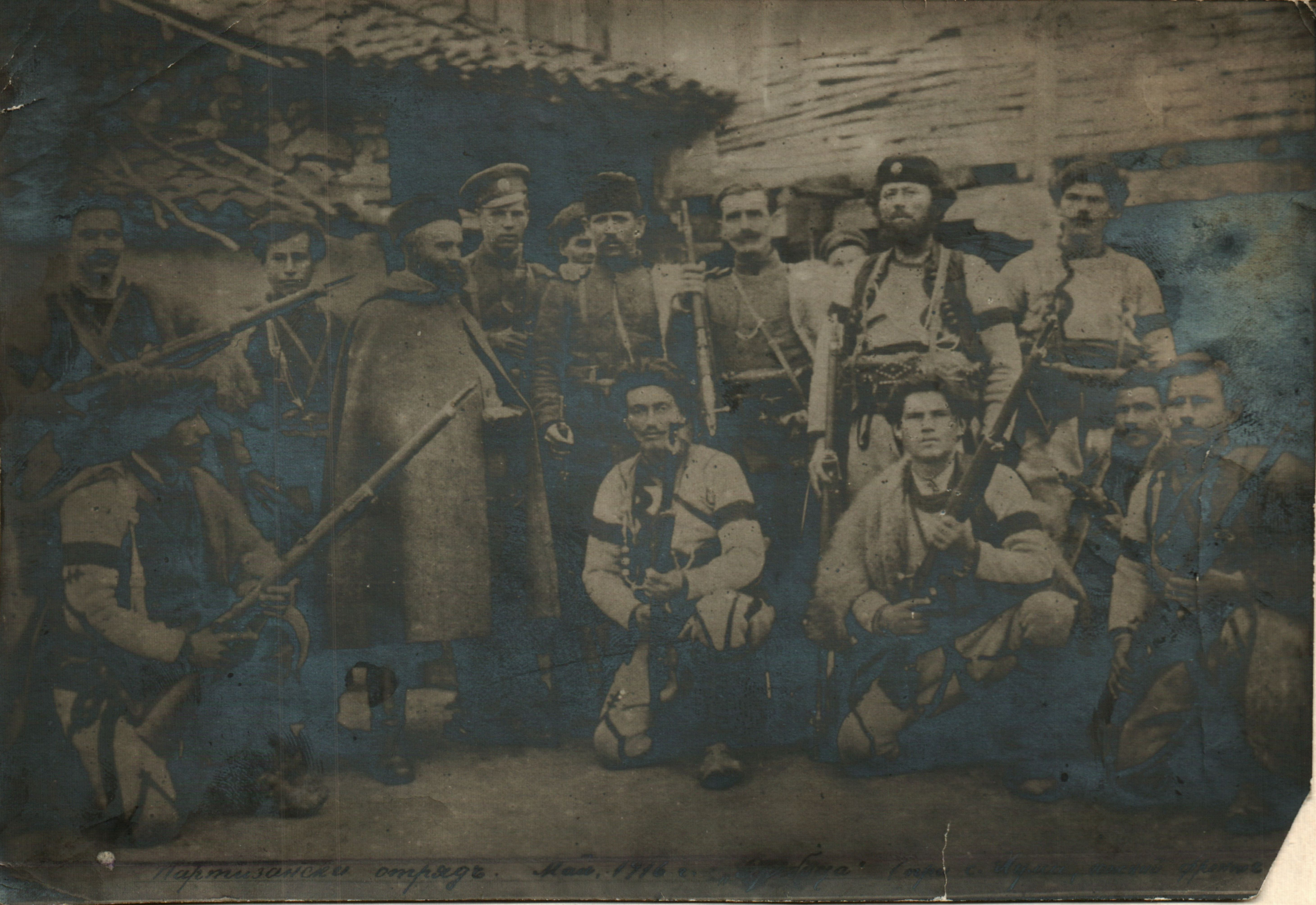 Снимка на партизански отряд „Яребица“, Южният фронт, с. Хумя.